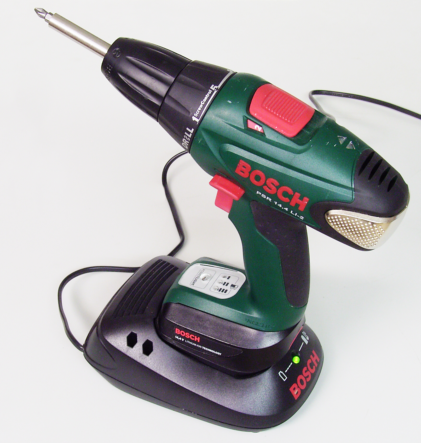 Akkuschrauber mit mechanischer Drehmomentbegrenzung, Zweiganggetriebe, Schnellspannfutter und Schnellladegerät